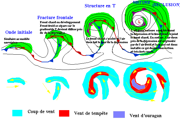 Le modèle cyclonique de Keyser-Shapiro, une meilleure image